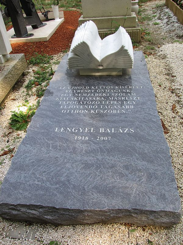 Lengyel Balázs (Budapest, 1918. augusztus 21. – Budapest, 2007. február 22.) műkritikus, író sírja Budapesten. Farkasréti temető: 25.